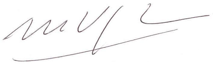 Mario Vargas Llosa signature